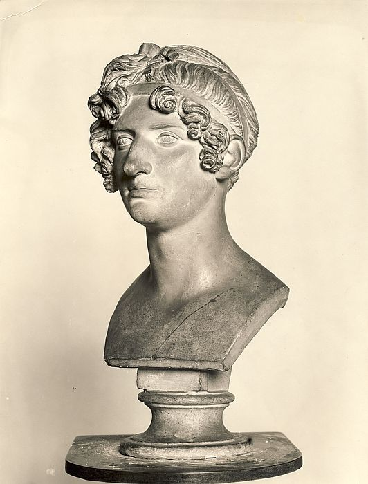 Александра Андреевна Дитрихштейн, ур. Шувалова (1774-1847)